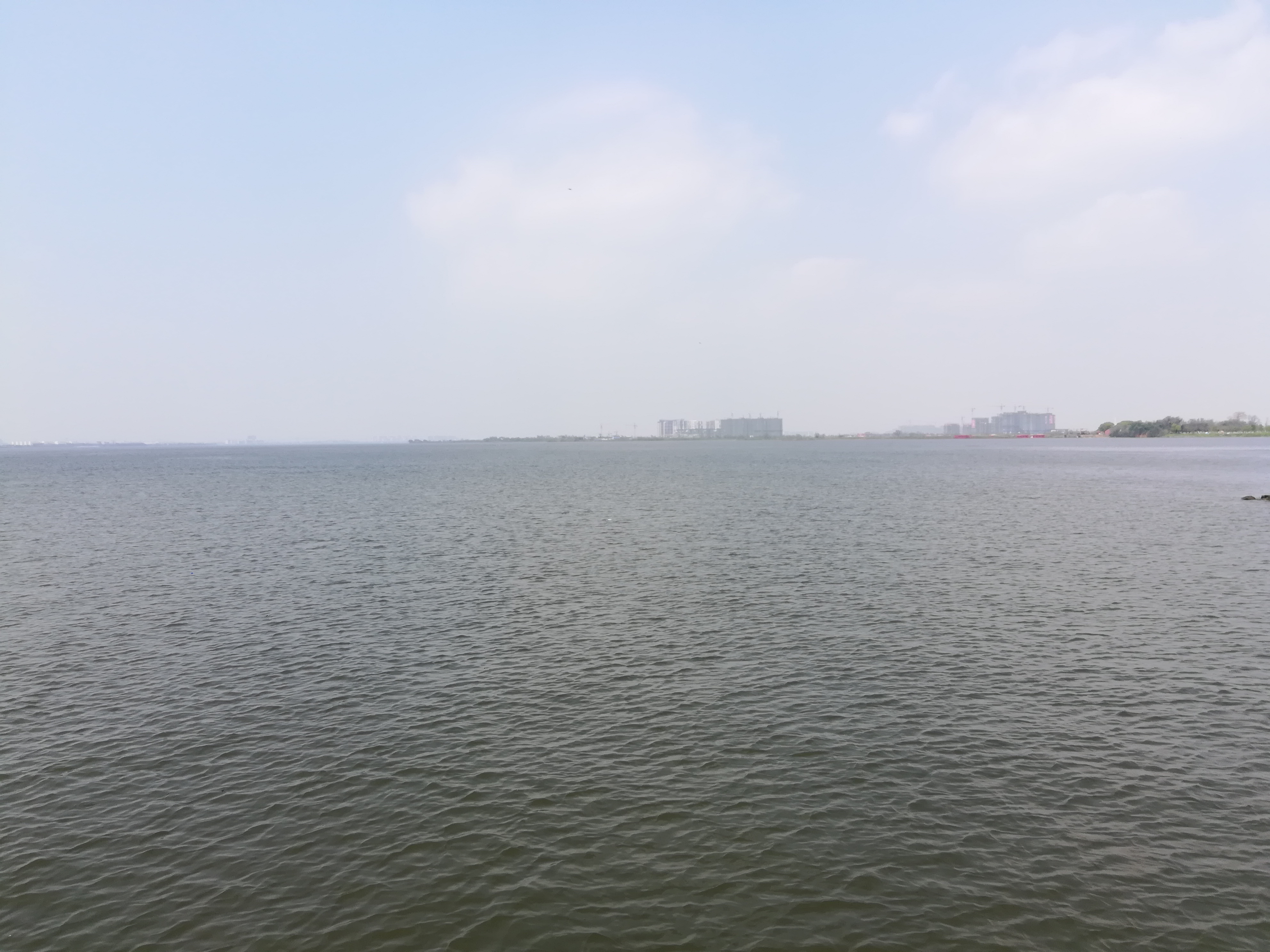 中文（中国大陆）: 南昌瑶湖。